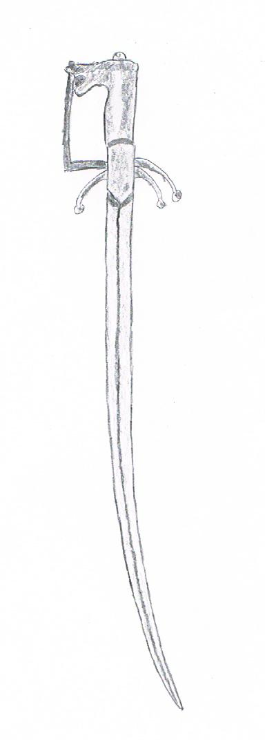 Nimcha